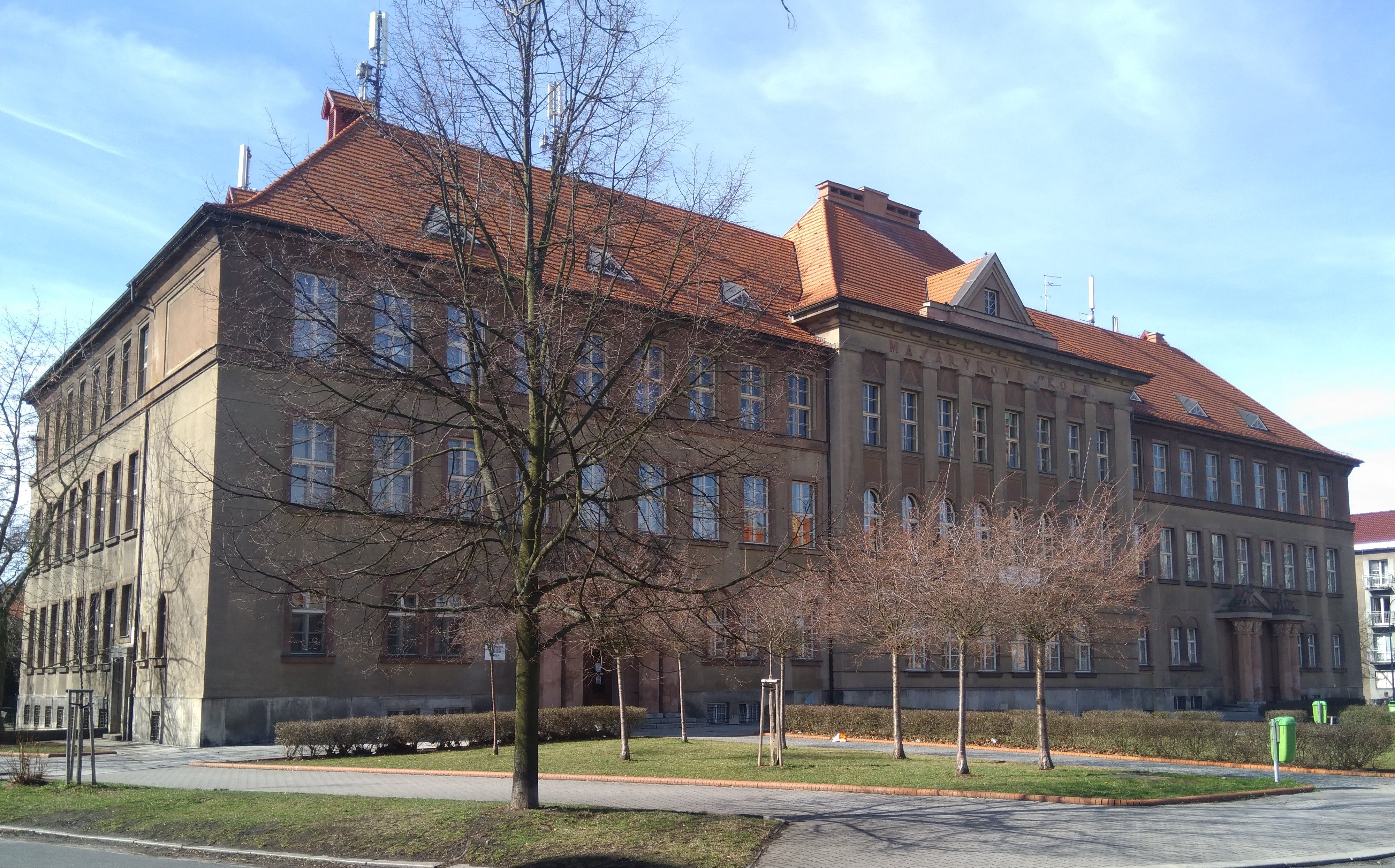 Masarykova základní škola v Plzni